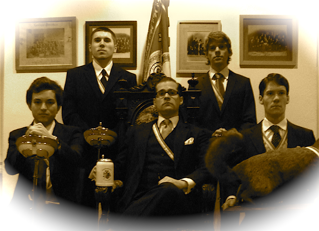 Das ChC des KStV Frankonia-Straßburg zu Frankfurt am Main